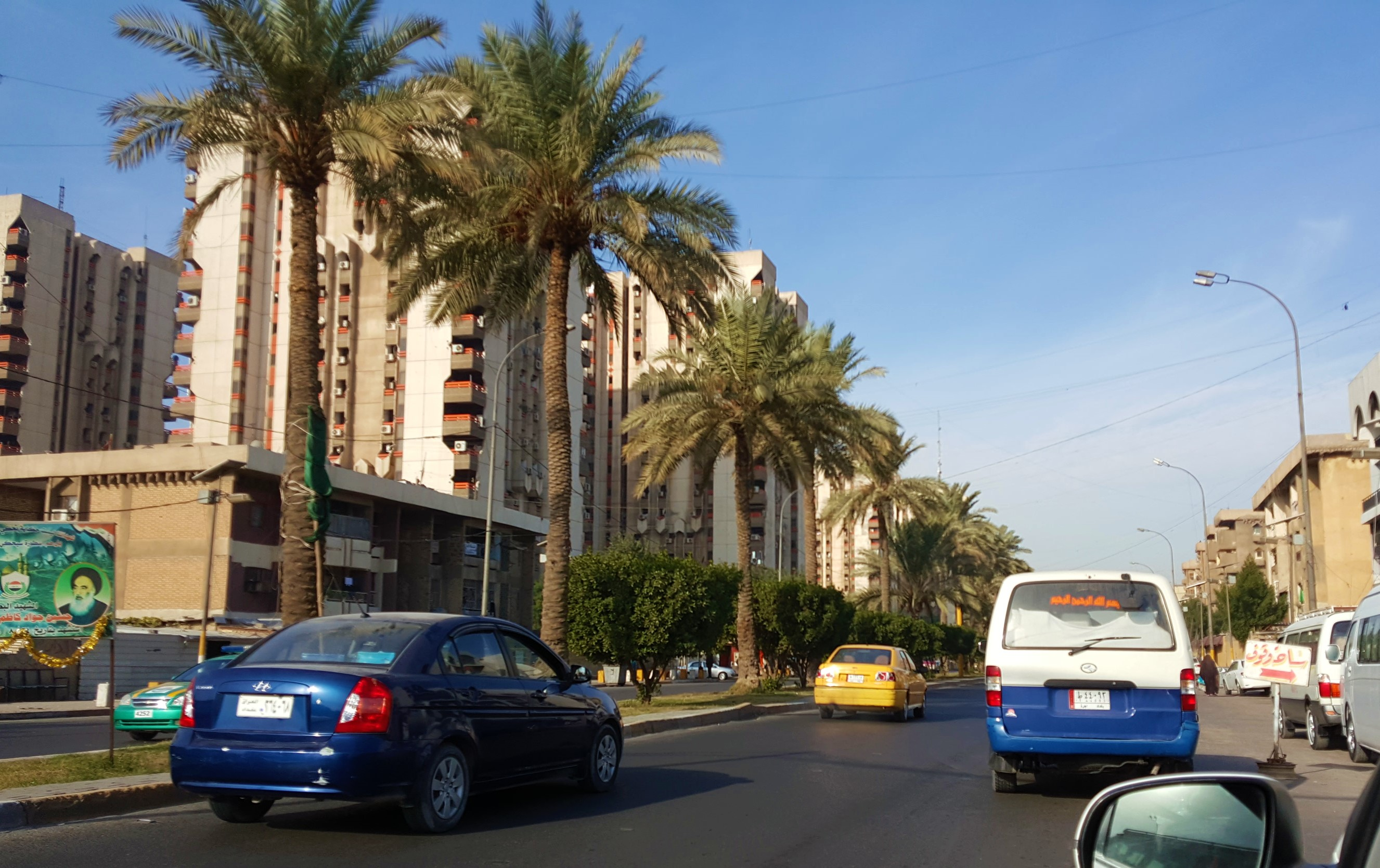 شارع حيفا في جانب الكرخ من مدينة بغداد.